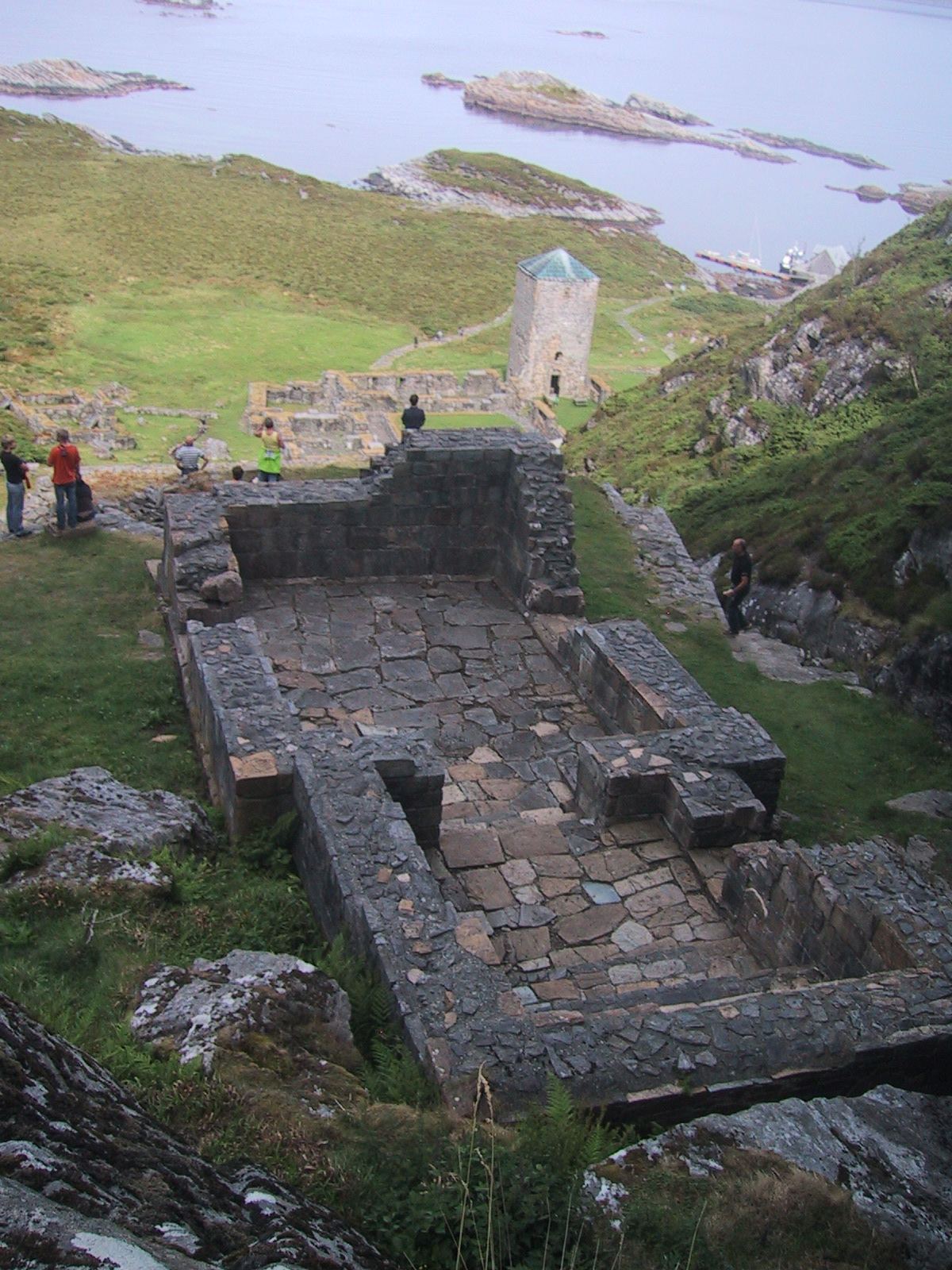 Sunnivakyrkjeruinane på Selja. Lenger nede ligg klosterruinane.